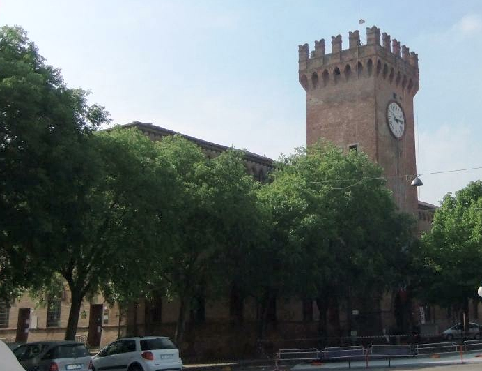 Castello sede del Comune di Poggio Renatico. Costruito nel medioevo è stato danneggiato nel terremoto in Emilia del 2012.